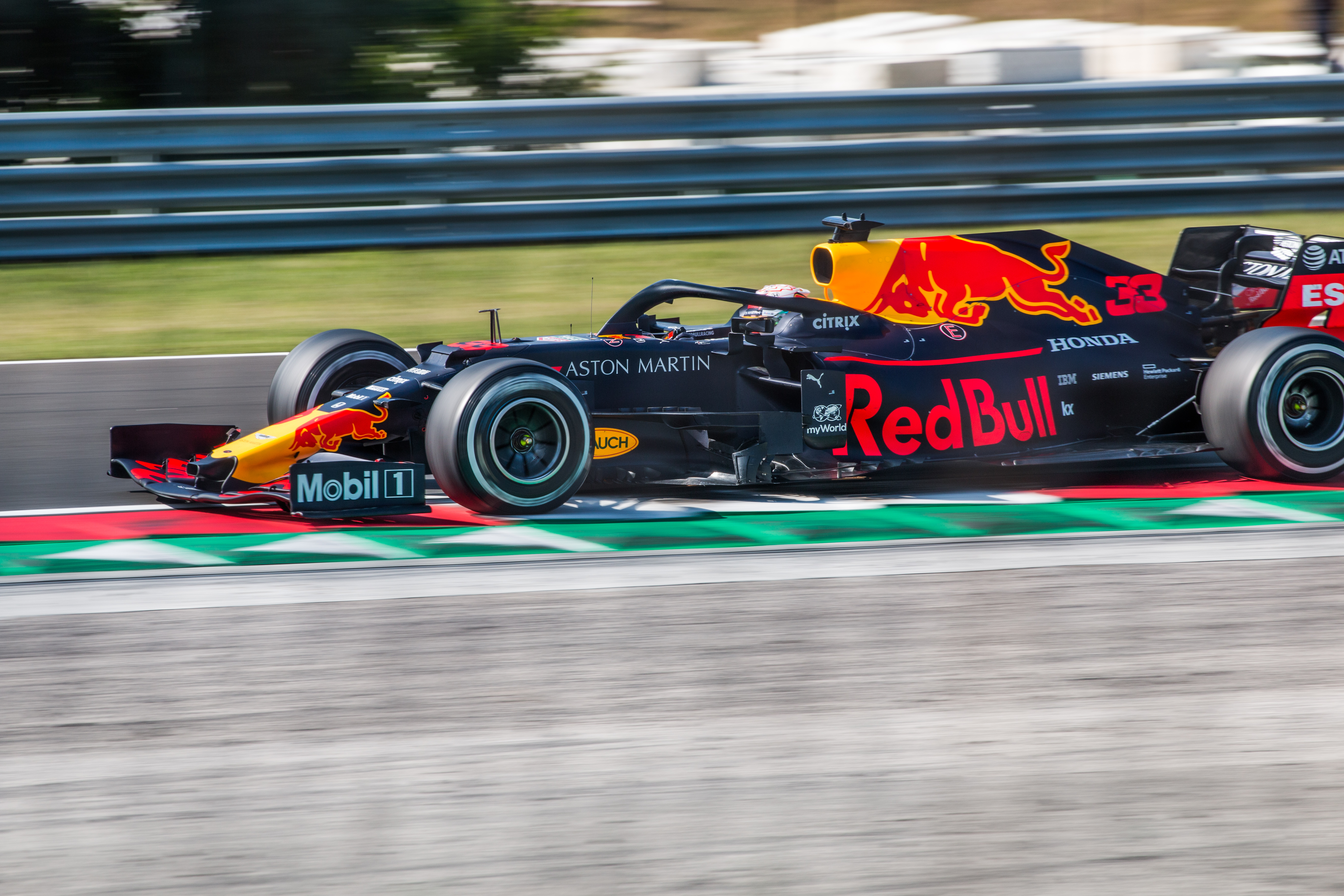 Max Verstappen in his Red Bull RB15 during Formula 1 Hungarian Grand Prix 2019 on the Hungaroring